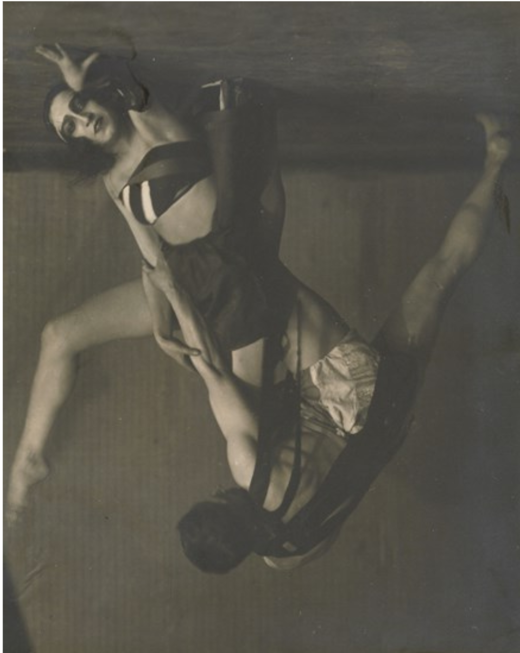 фото с этюдом